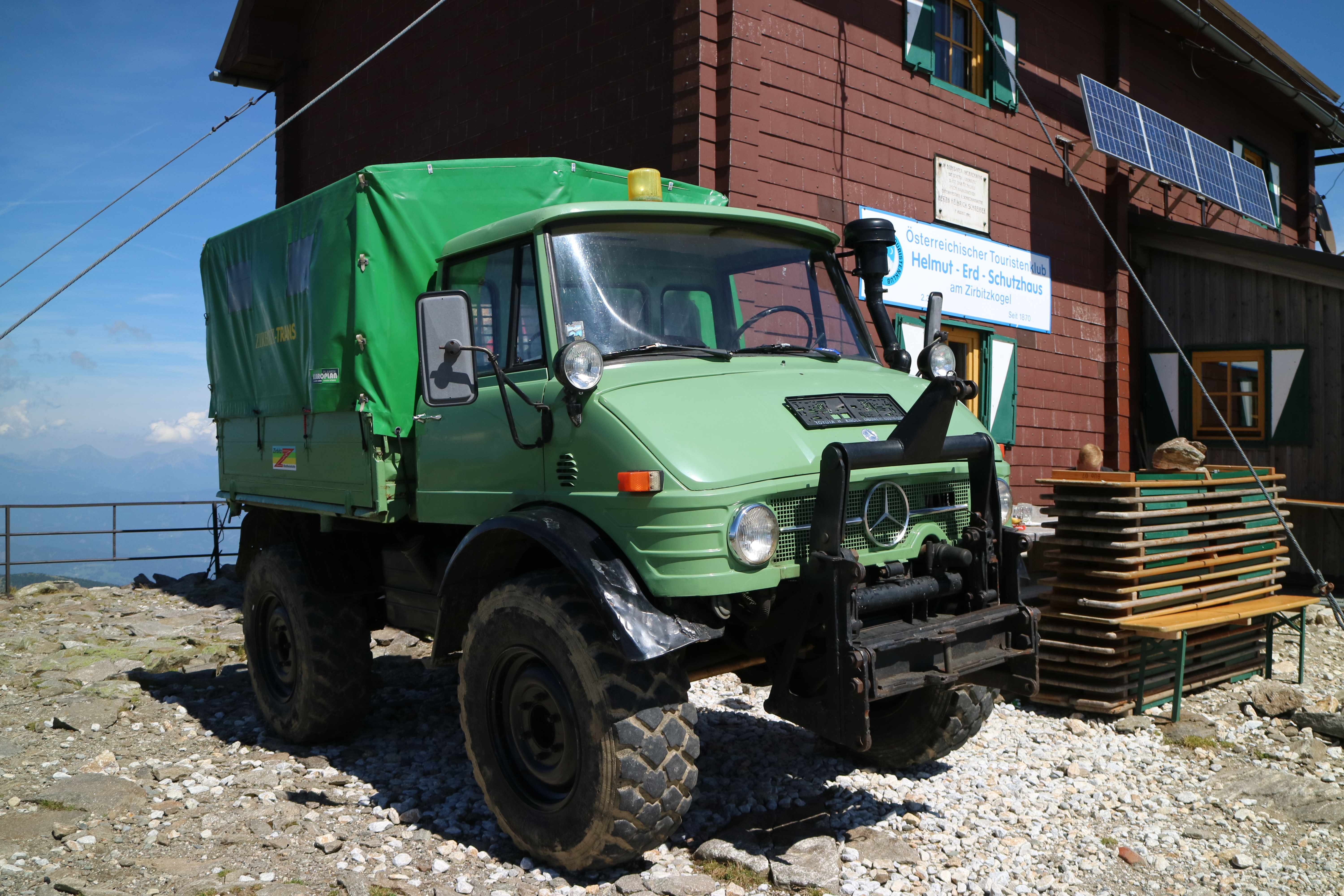 Hütteneigener Unimog beim Zirbitzkogel Schutzhaus